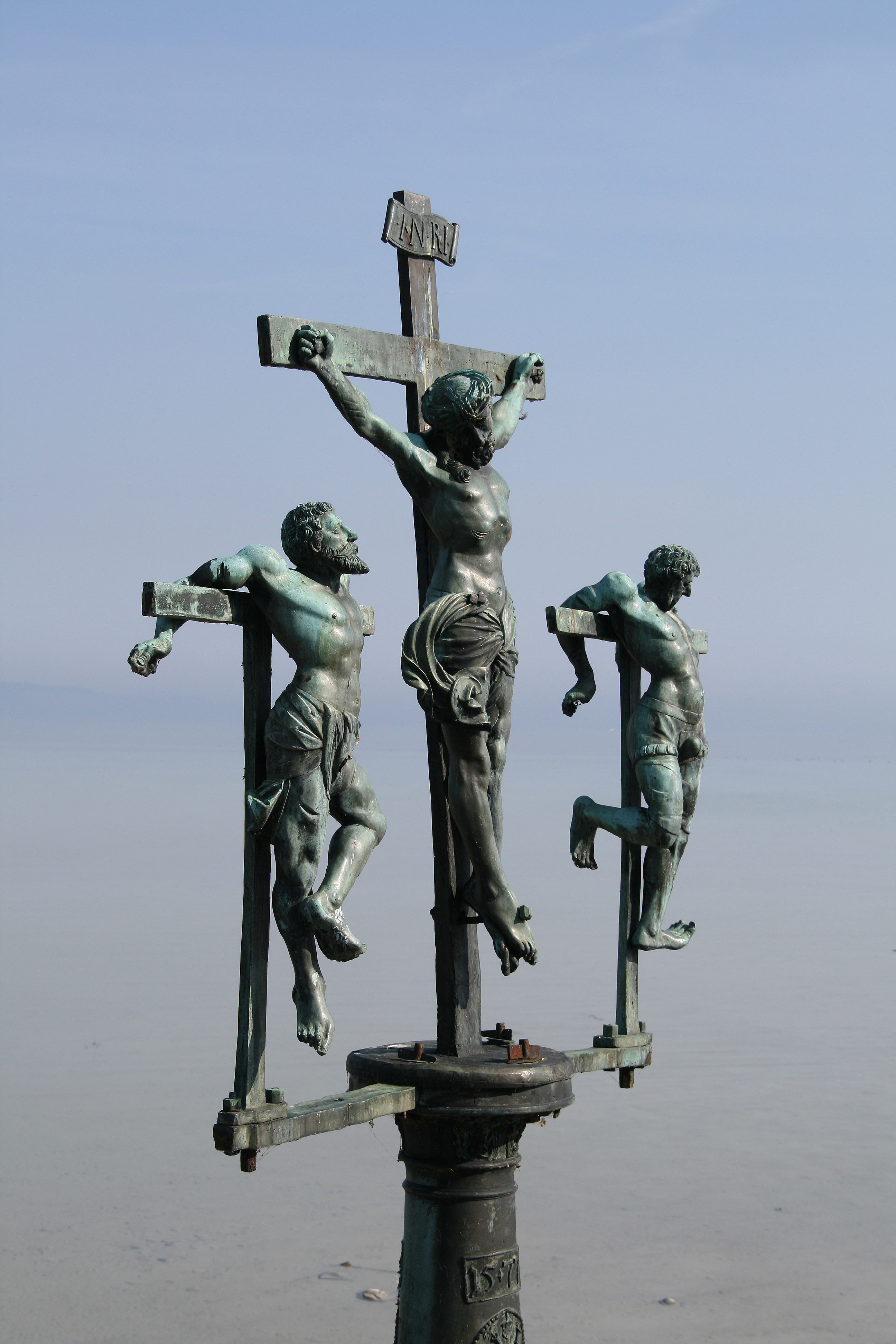 Im 30-jährigen Krieg gelangte die Insel Mainau im Bodensee 1647 nach einer verheerenden Niederlage gegen die Schweden für einige Monate in deren Besitz. Unter Mitnahme alles Wertvollen - nur das sogenannte Schwedenkreuz blieb zurück - zogen die Schweden 1649 wieder ab.